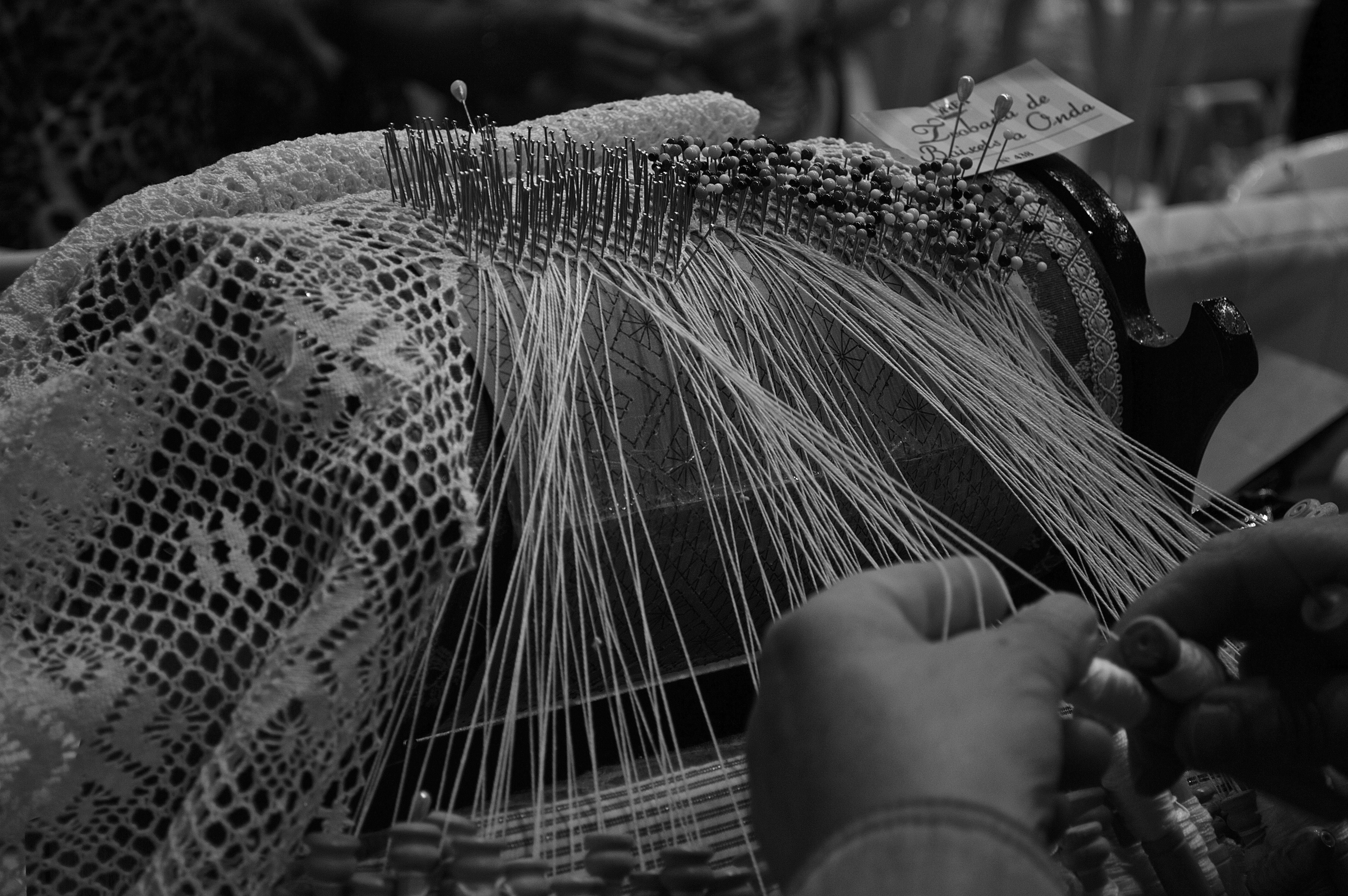 Concentracio de boixets